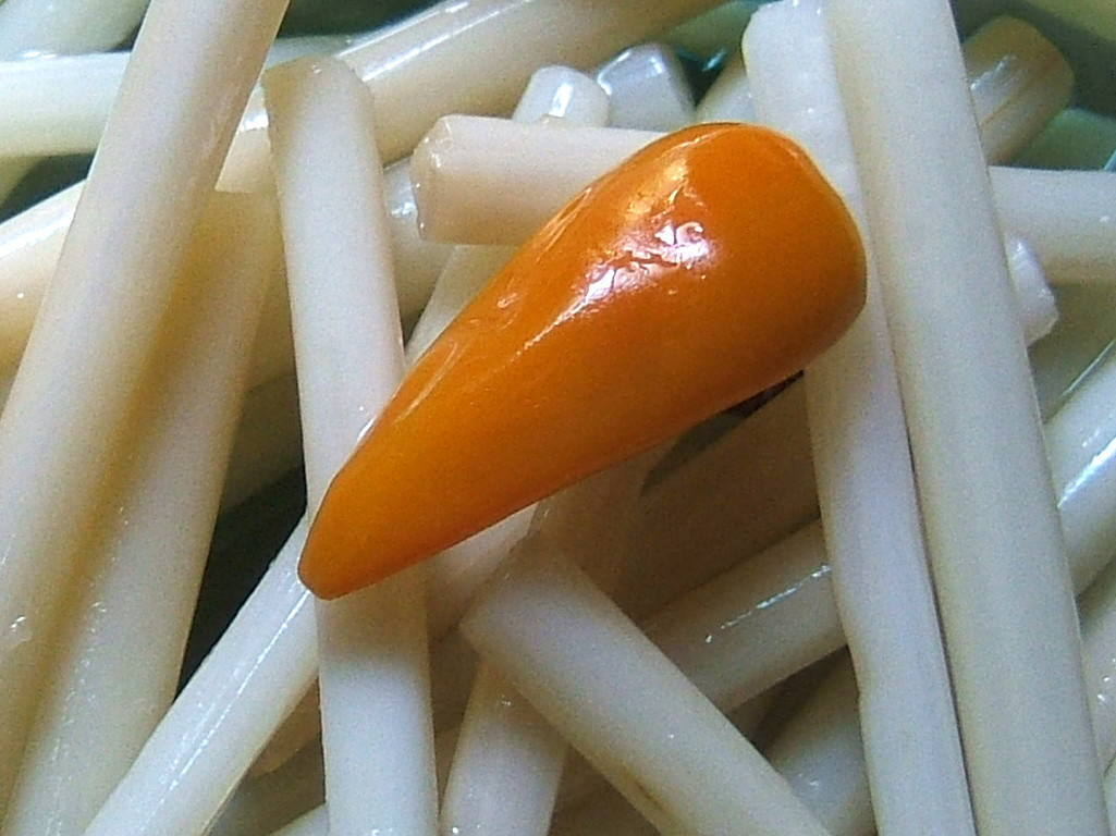 pickled lotus root (ngó sen)